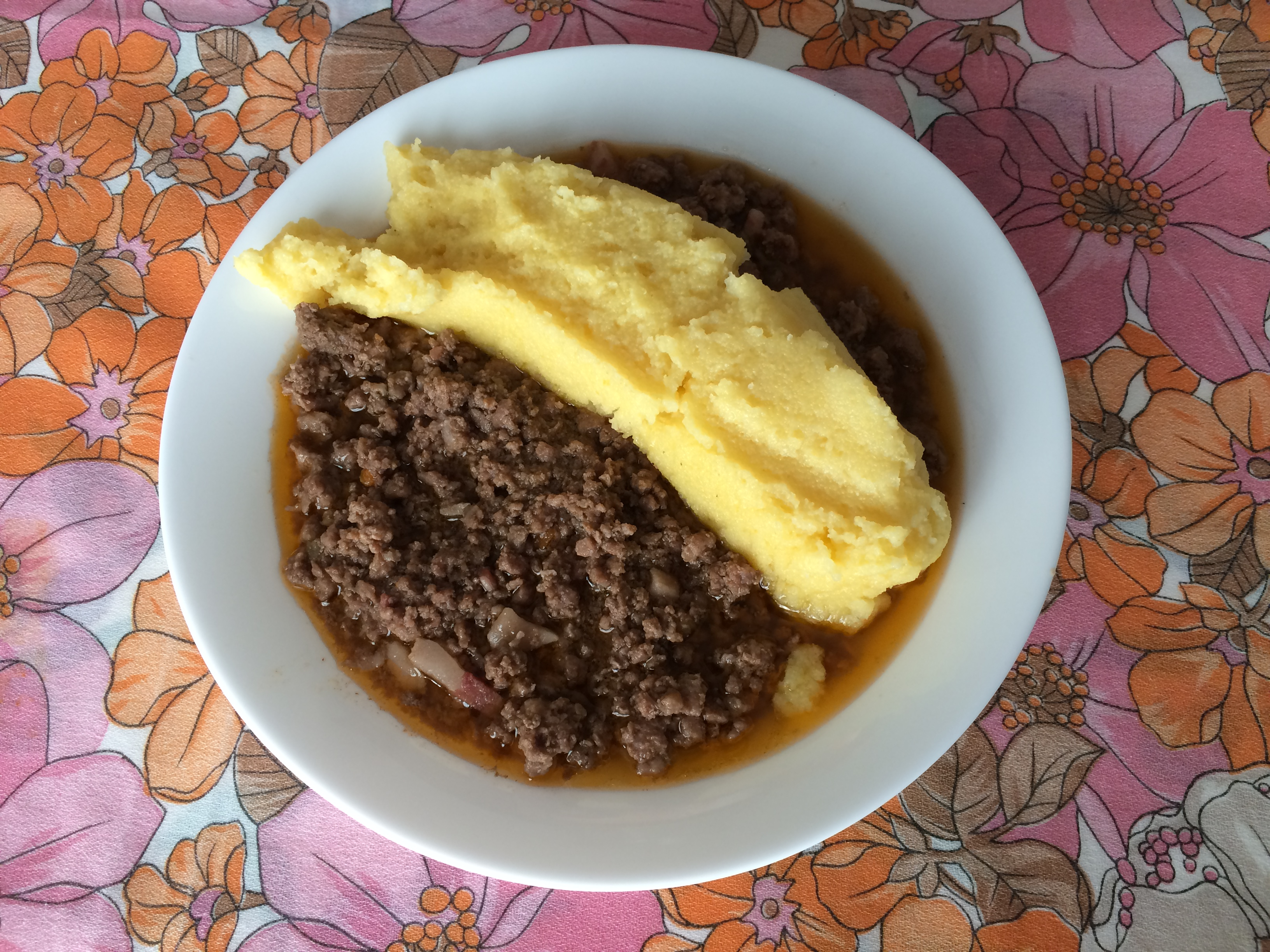 Un piatto di polenta e brüscitt